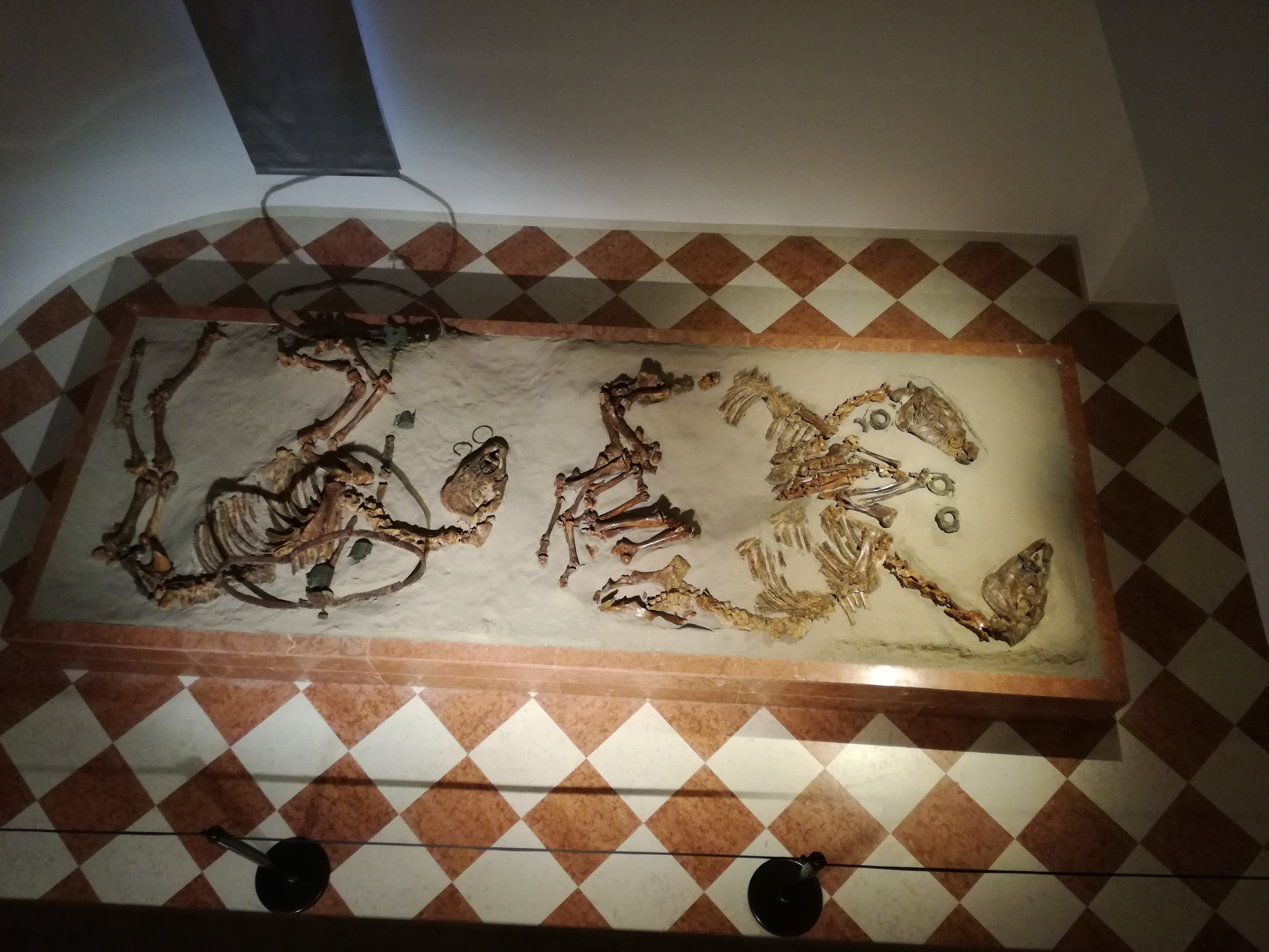 Tomba della biga all'interno del Museo Archeologico di Adria, vista dall'alto.